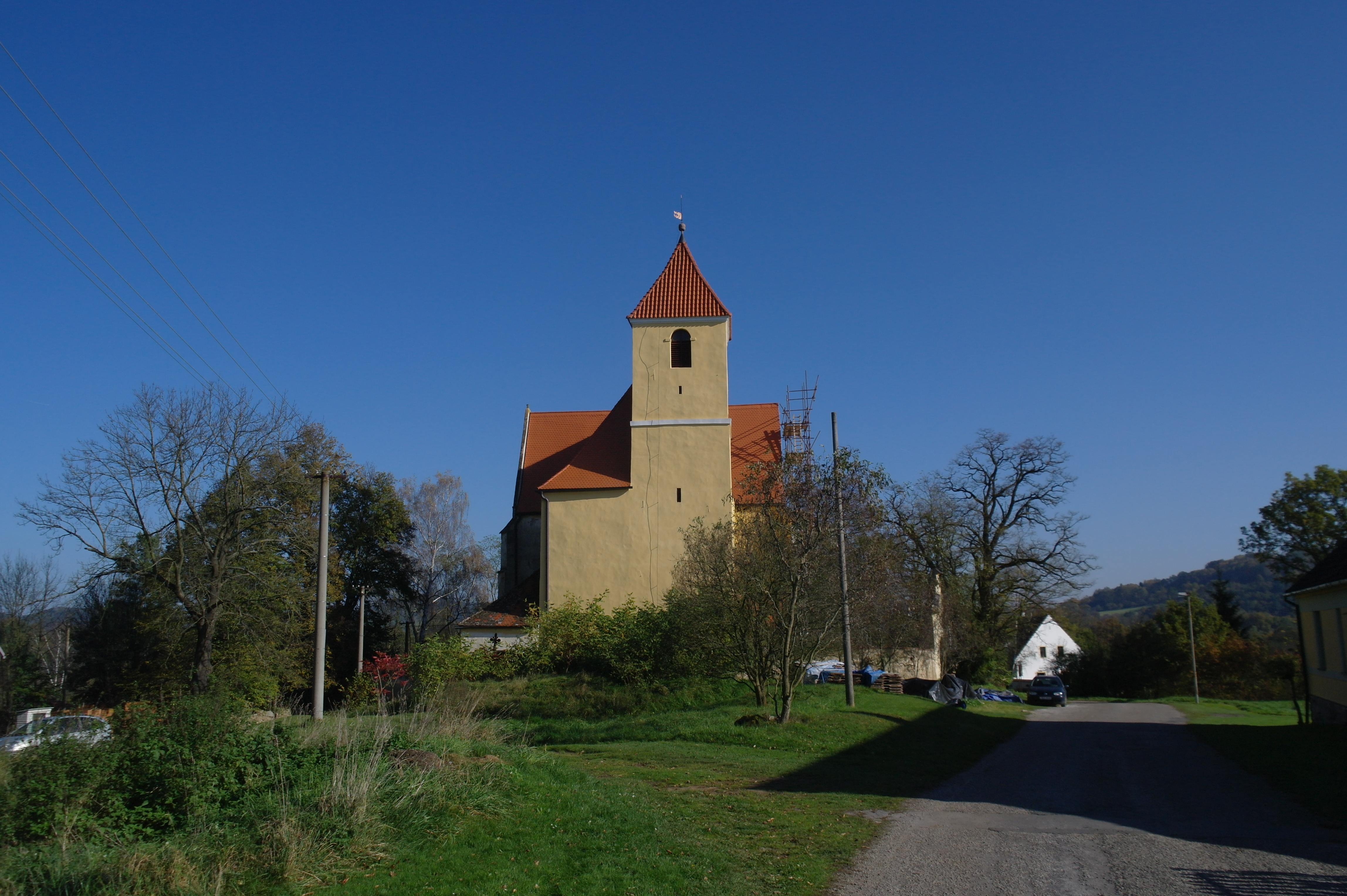 Pohled na kostel sv. Jiljí a Blanici ze západu